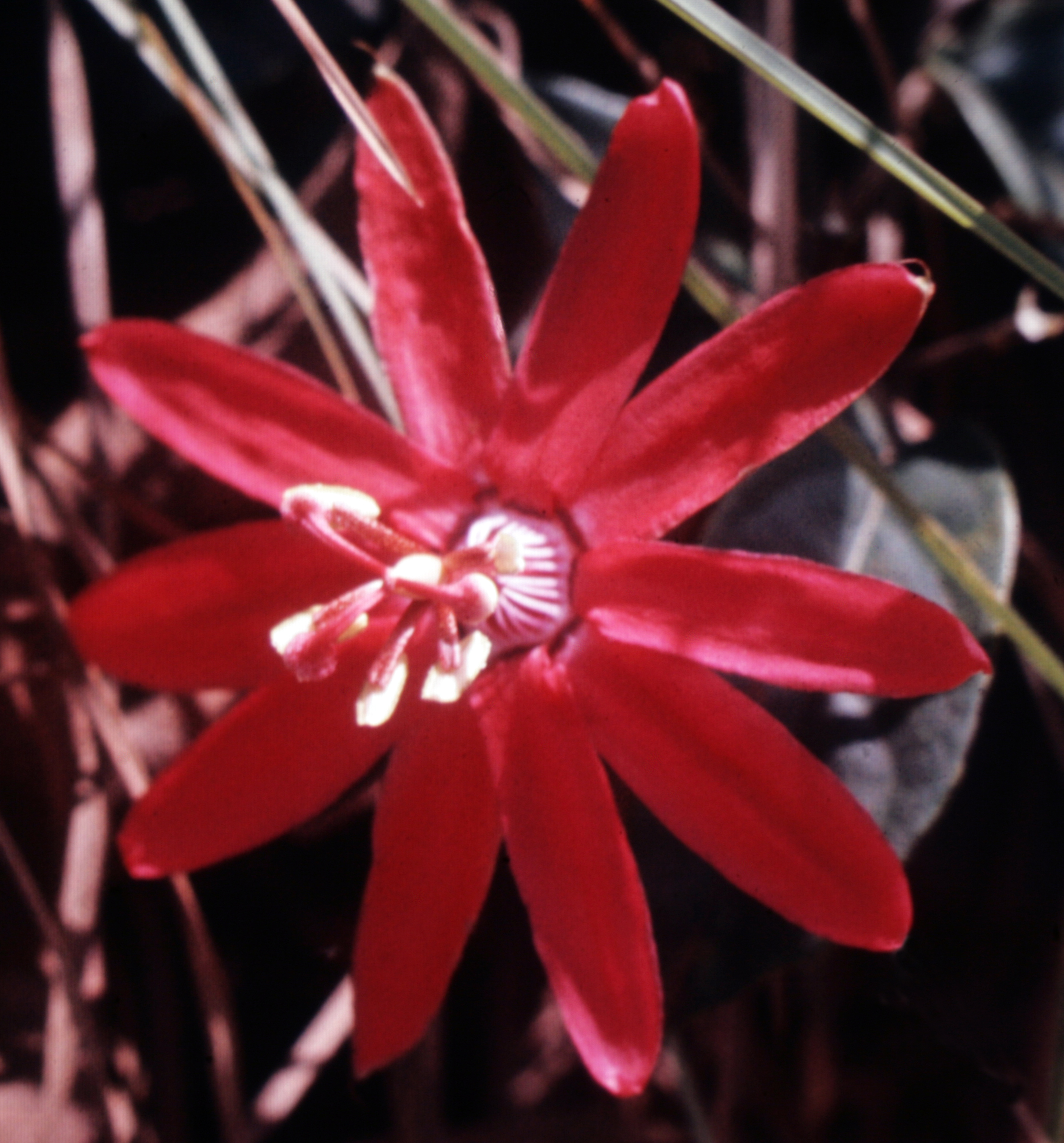 Passiflora glandulosa. Suriname.